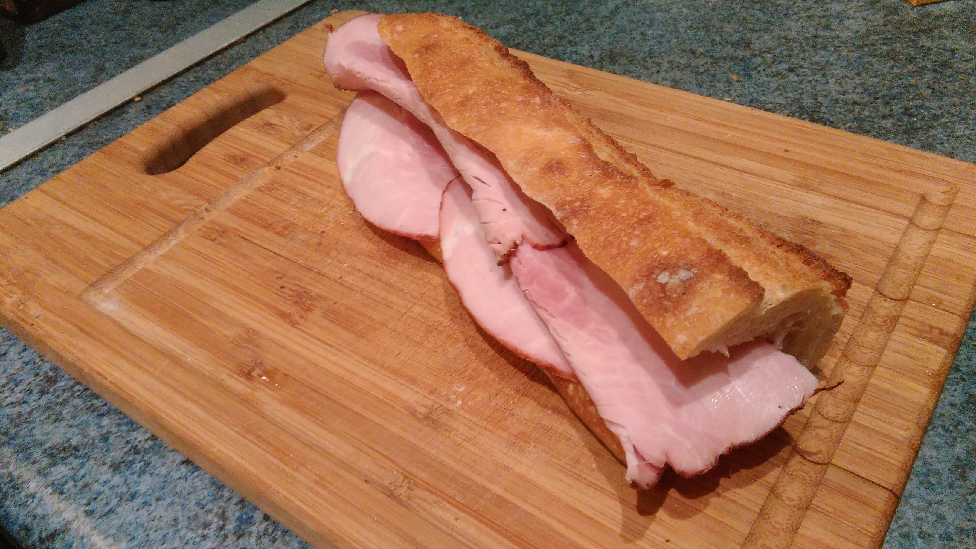 Jambon beurre cornichon classique